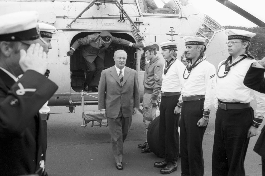 Leber trifft mit dem Hubschrauber zu seinem ersten Besuch beim MFG 5 ein.